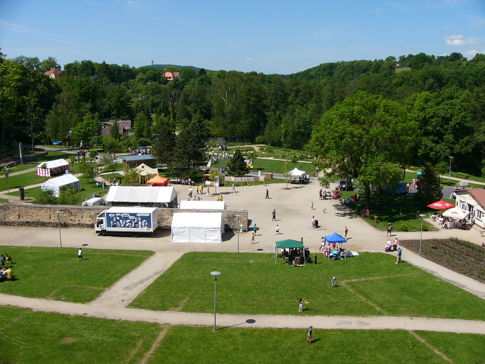 Bambiriada in Cheb auf dem Parkgelände unterhalb der Burg